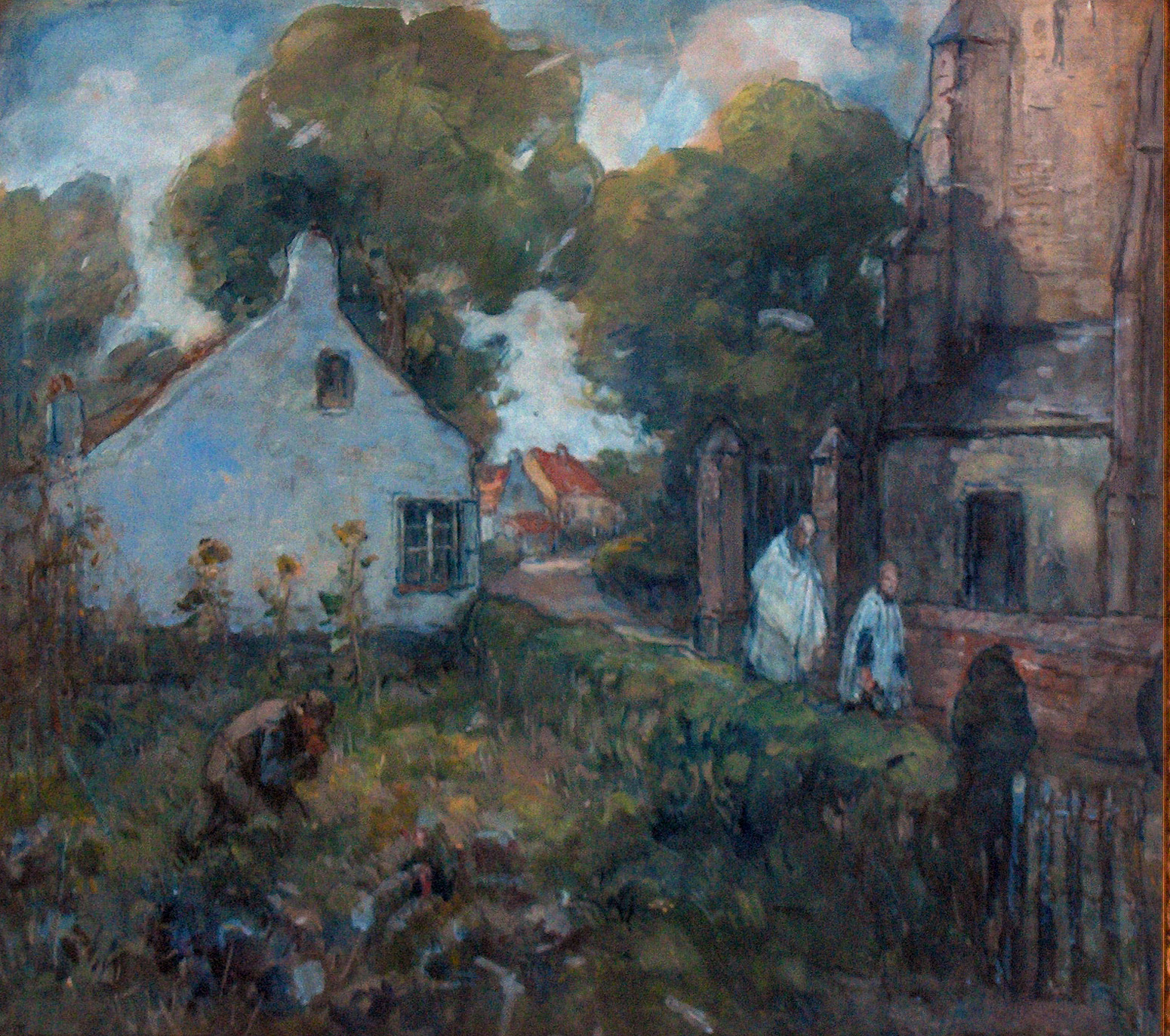 "Berechting in de oude Kerkstraat", gouache door Louis Ludwig (1856-1925); gemeentelijk patrimonium Knokke-Heist, België